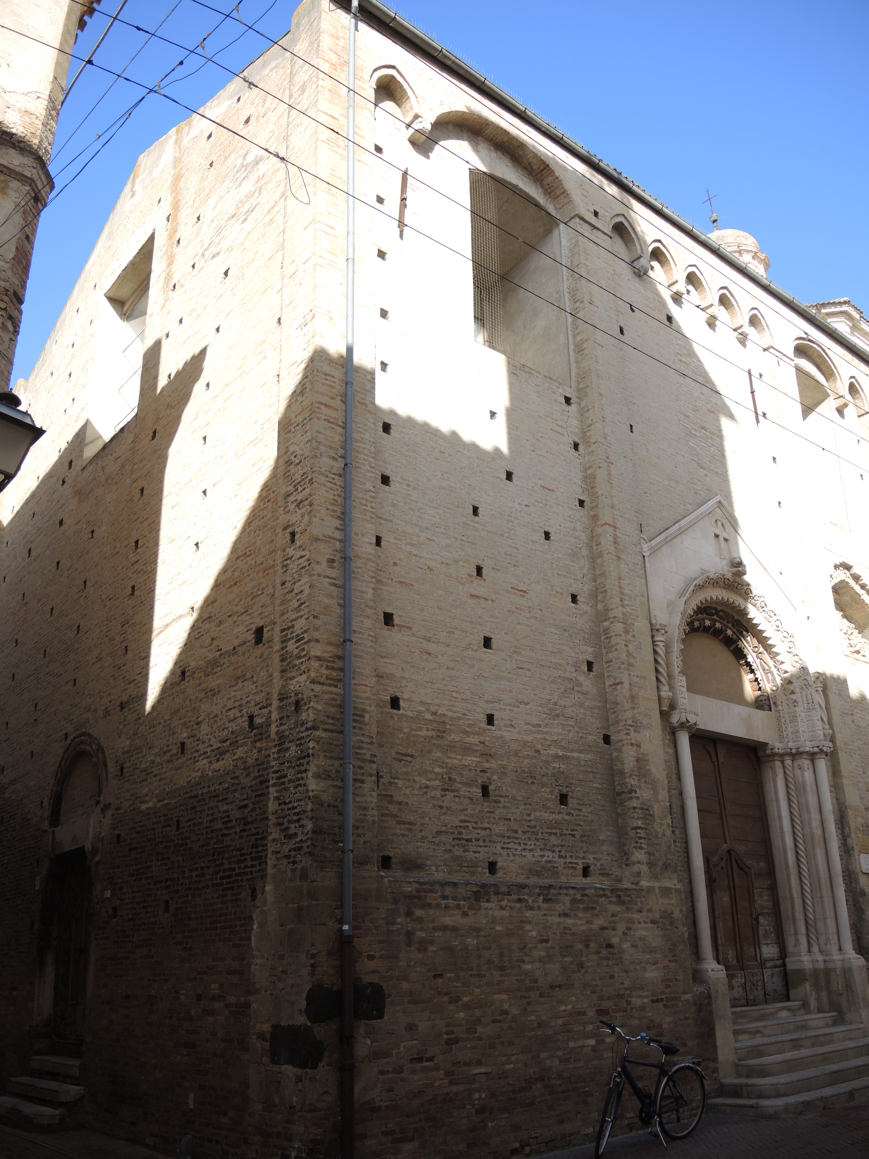 Città Sant'Angelo: Chiesa di San Francesco